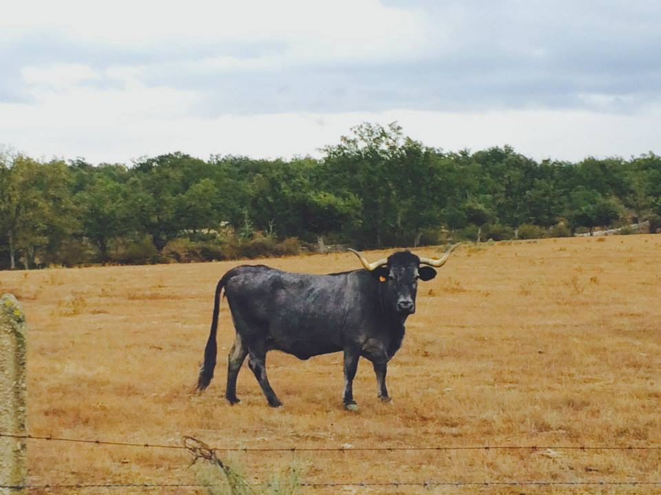 Morucha (raza bovina), raza típica de la zona.